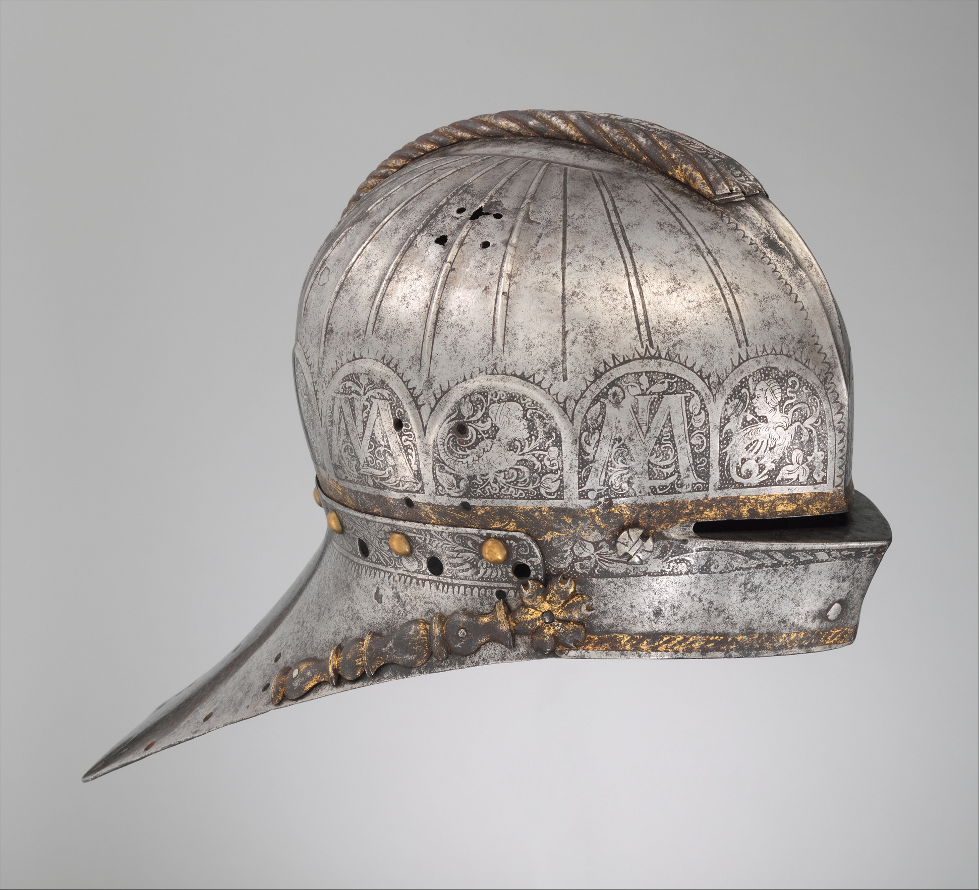 German, Augsburg; Jousting sallet (Rennhut); Helmets